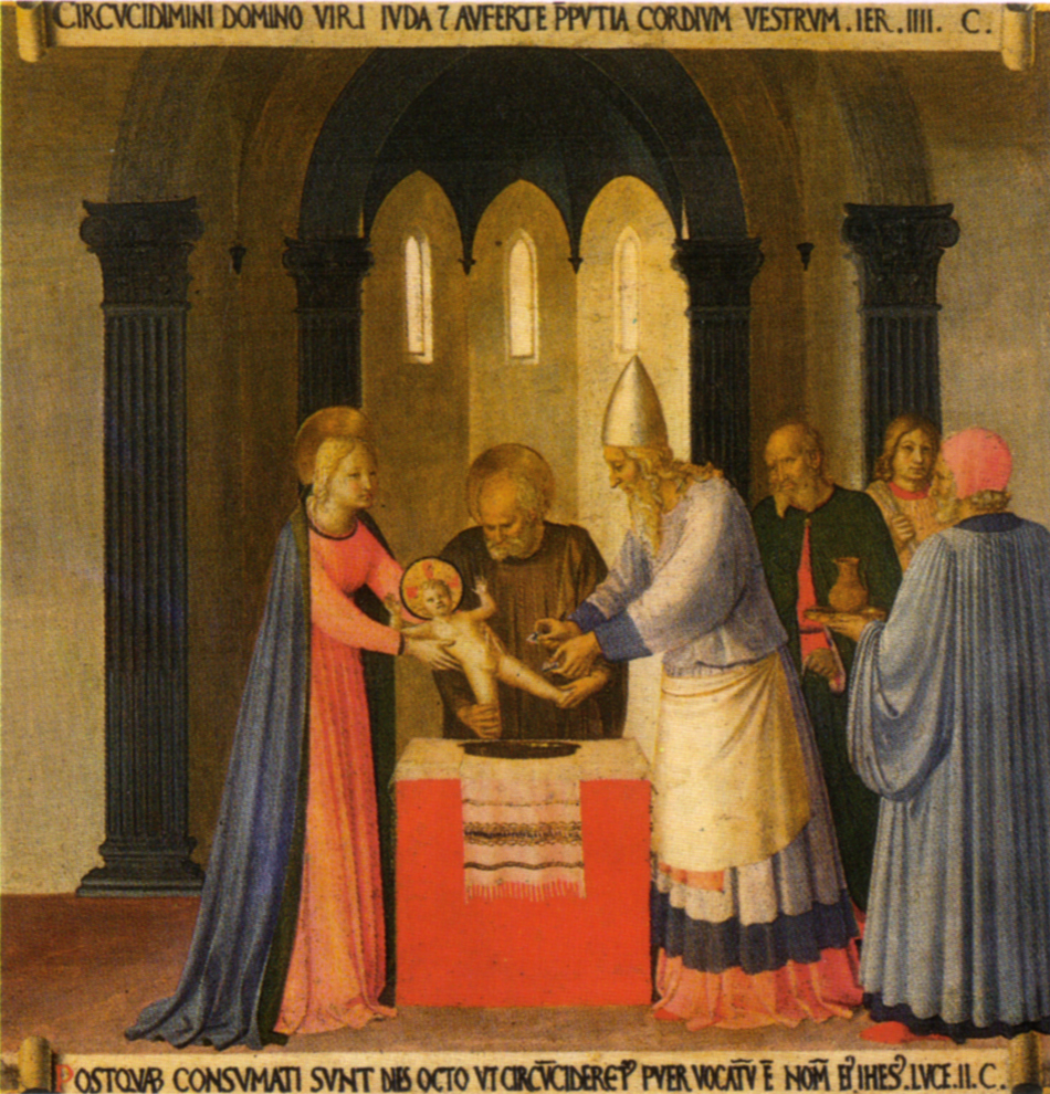 Armadio degli argenti, criconcizione di Cristo